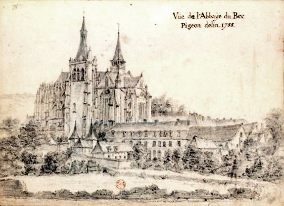 Vue de l'Abbaye du Bec